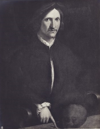 Autoritratto, tavola, 24.8 x 19.4 cm, Uffizi, Firenze